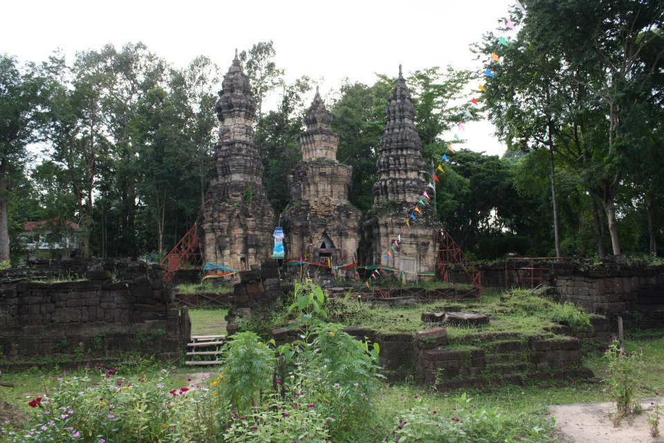 ปราสาทห้วยทับทัน